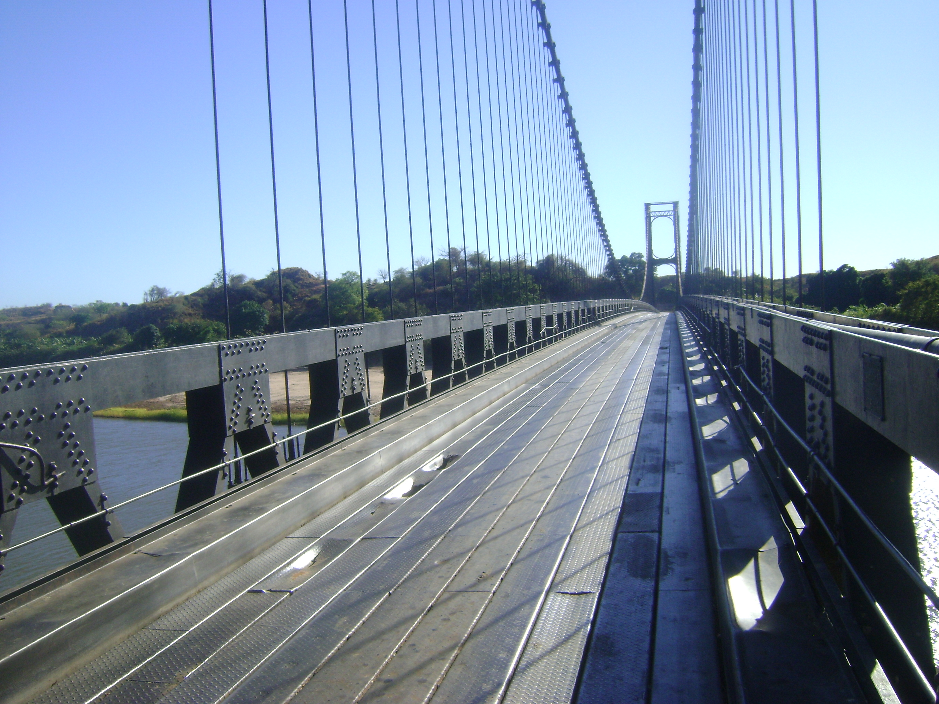 Vue du Pont de la Kamoro sur la RN4, au dessus du Fleuve Betsiboka - Mahajanga Madagascar